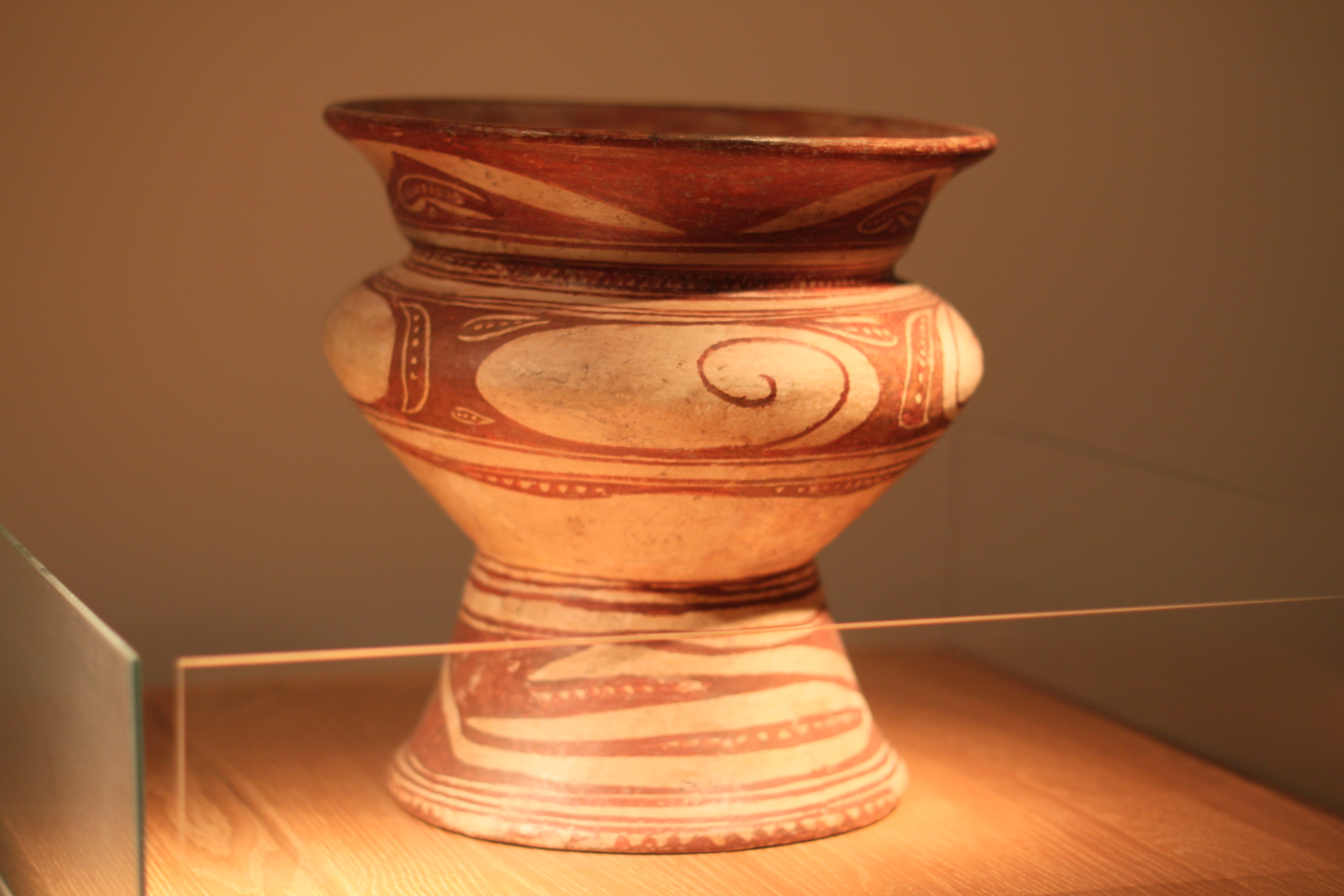 Kunst aus Thailand im Museum für Asiatische Kunst, Belin-Dahlem; Fußschale; Thailand; Ban Chiang-Kultur; 200 +/- 200 v. Chr.; Keramik; bemalt; Höhe 32 cm; Durchmesser 31 cm